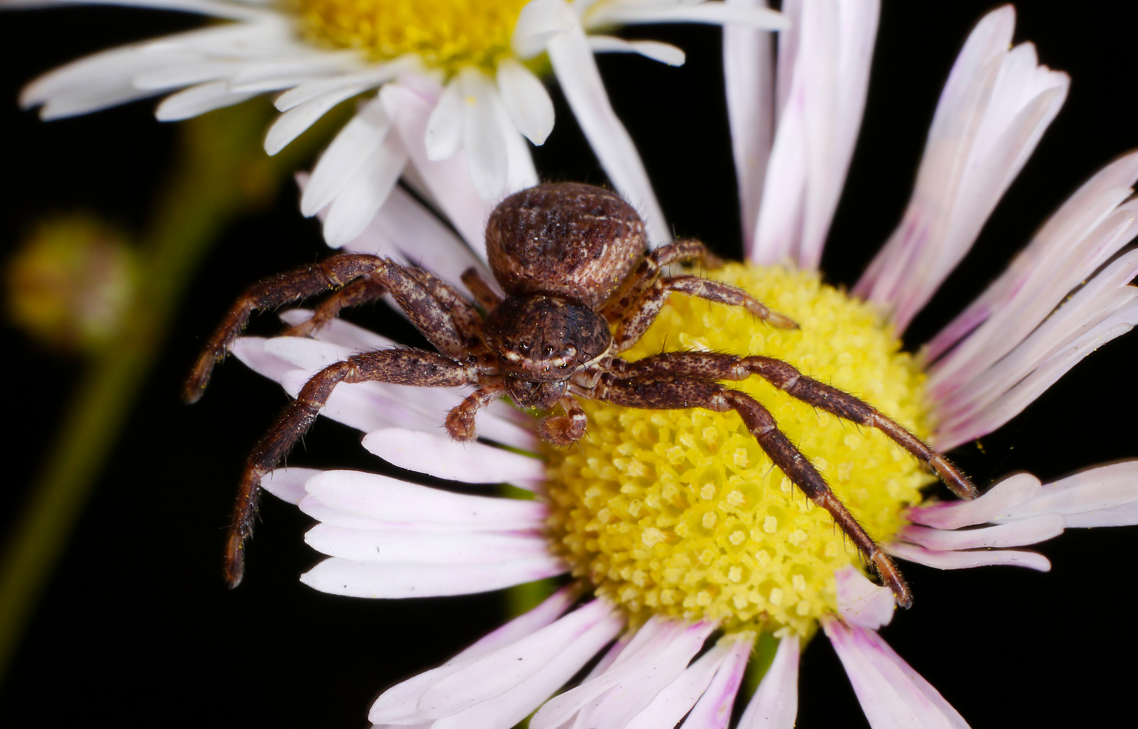 Krabbenspinne - Xysticus audax, Männchen. Artbestimmung durch Tobias Bauer. Aufgenommen in Mannheim-Vogelstang, Baden-Württemberg, Deutschland.